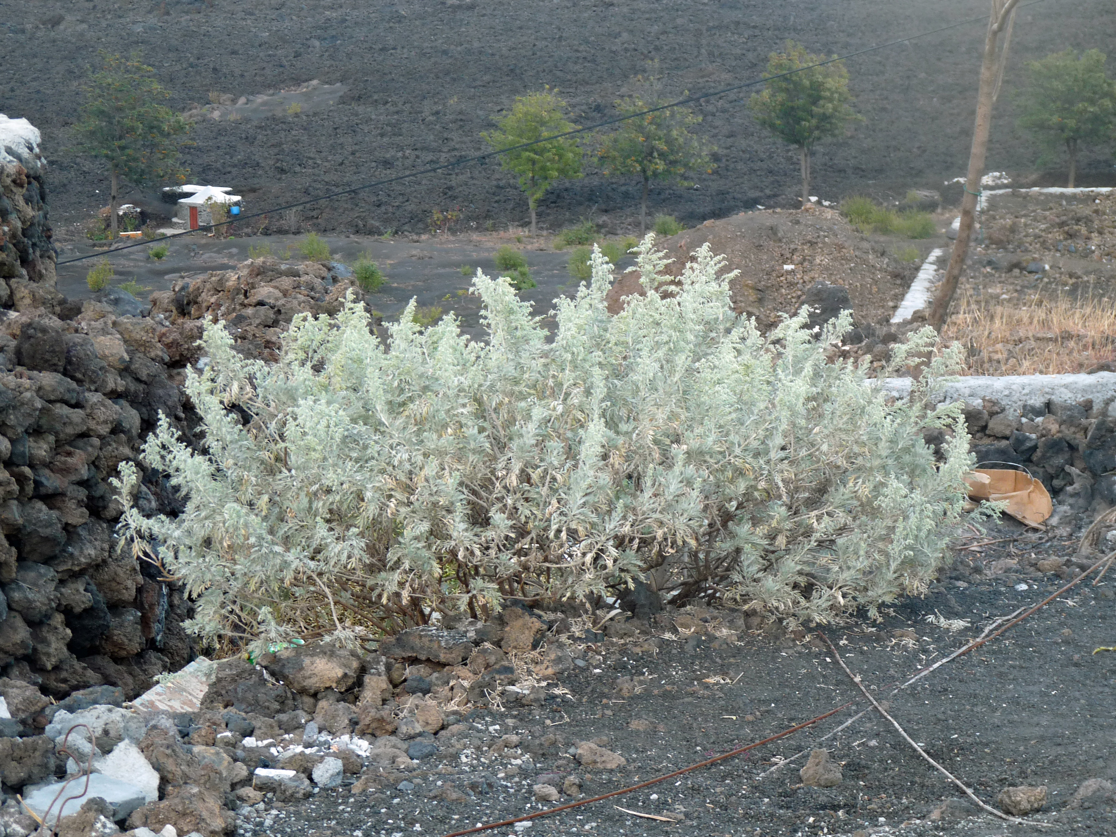 Chã das Caldeiras (île de Fogo, Cap-Vert) : Artemisia gorgonum, plante endémique